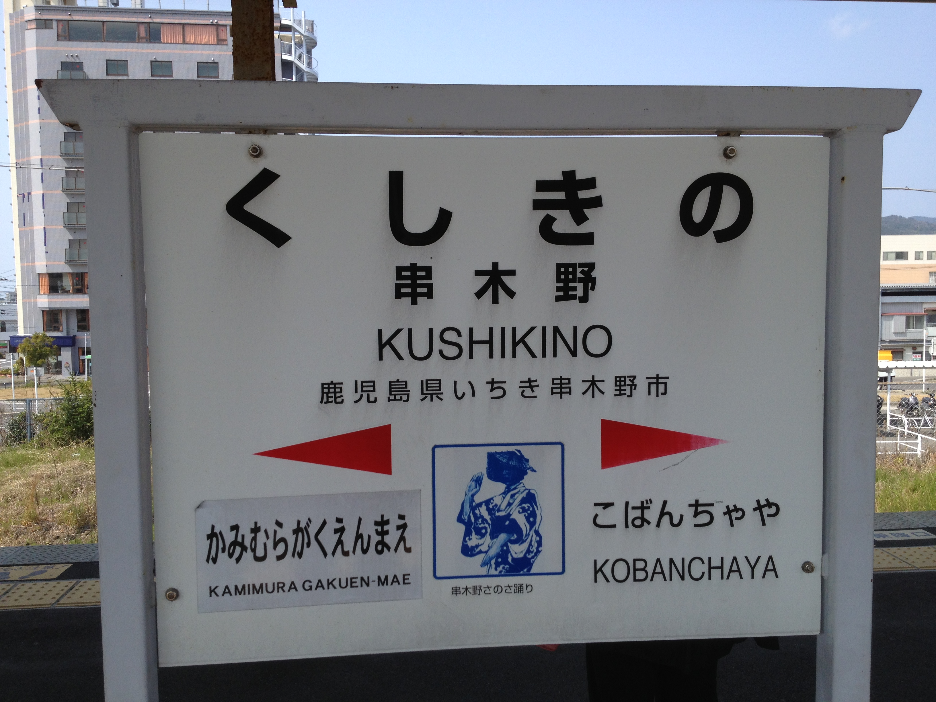 串木野駅 駅名標